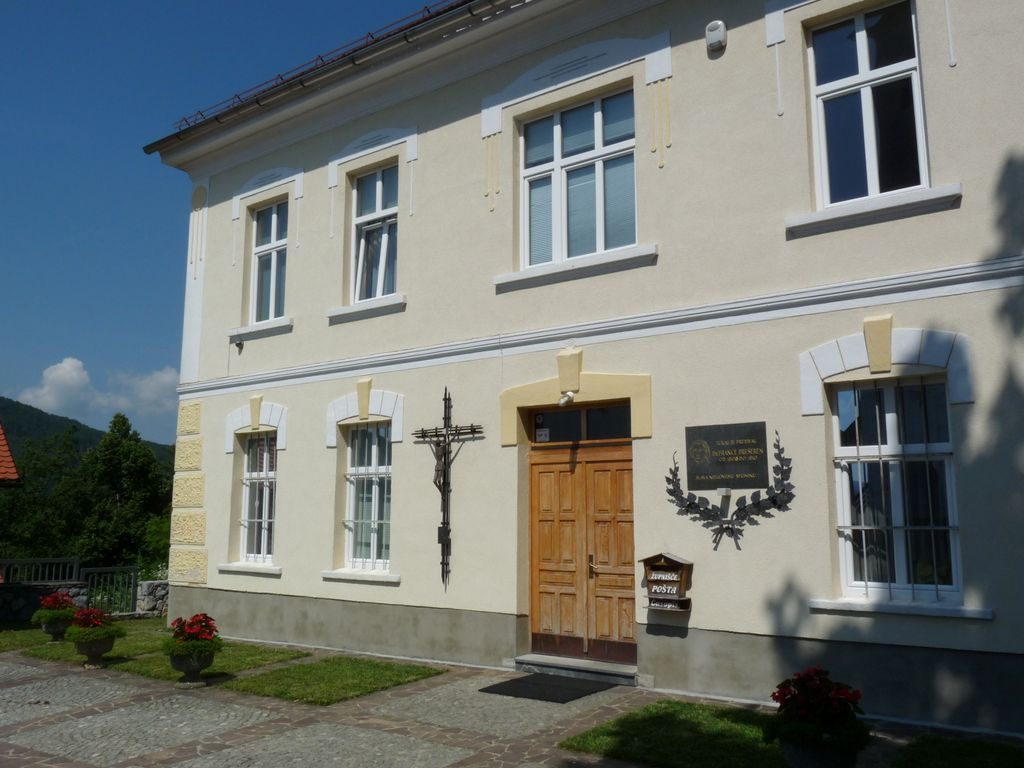 Župnišče na Kopanju